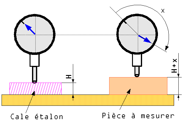 principe d'utilisation d'un comparateur à cadran. Auteur/Author Romary 2005